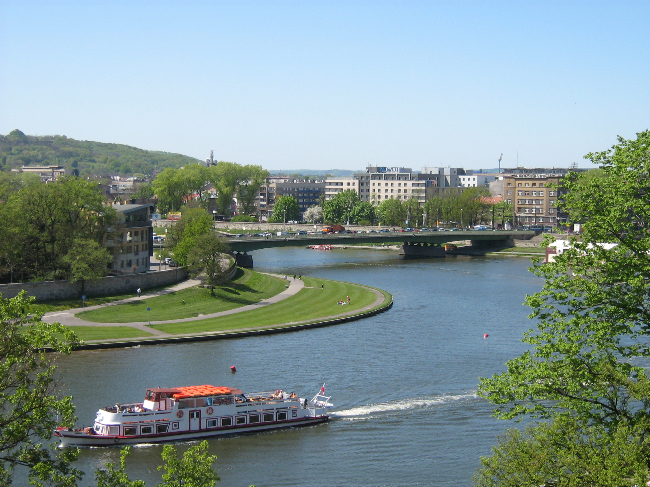 Wisła w Krakowie. Widoczny również most Dębnicki.